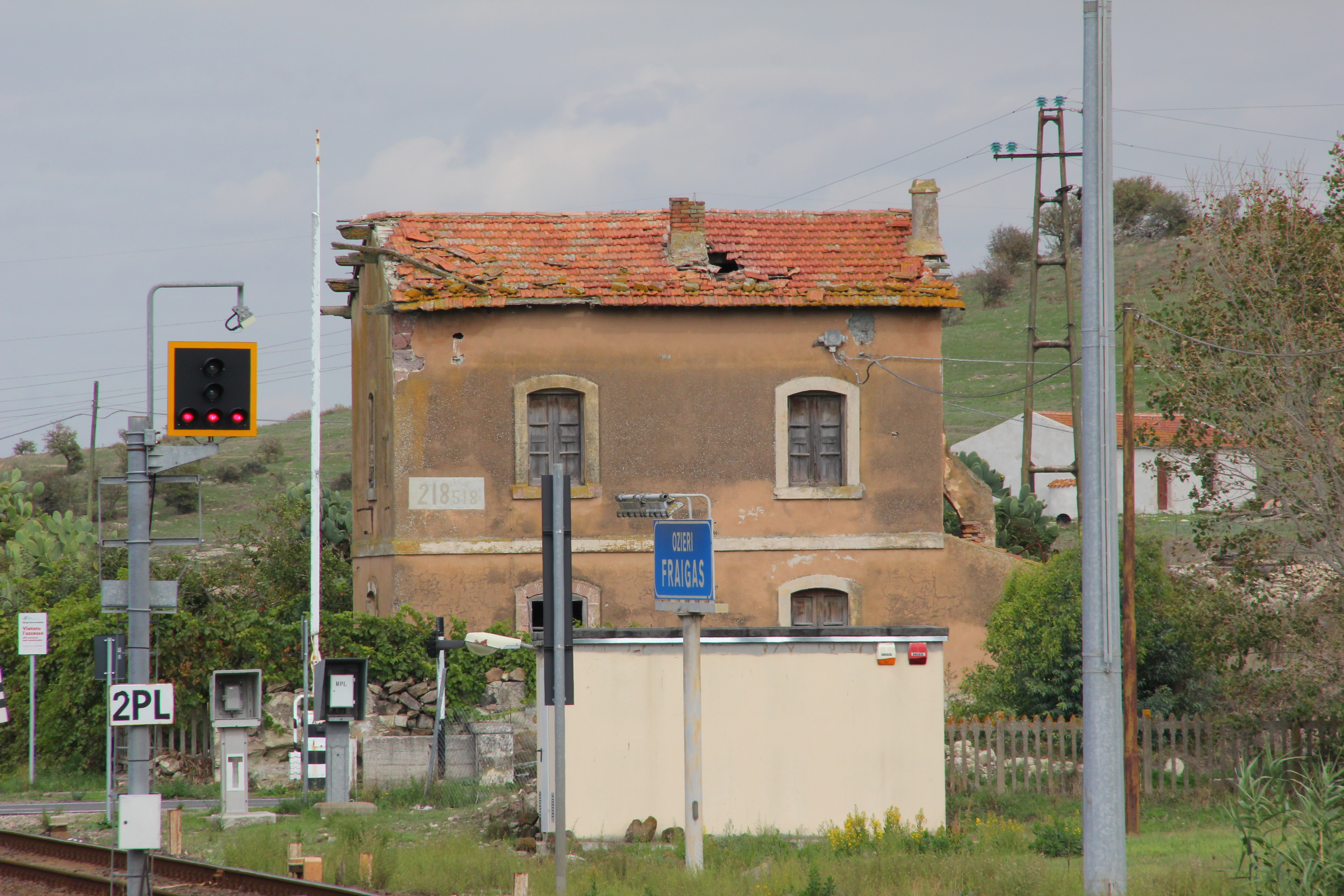 Ozieri - Casello di Fraigas